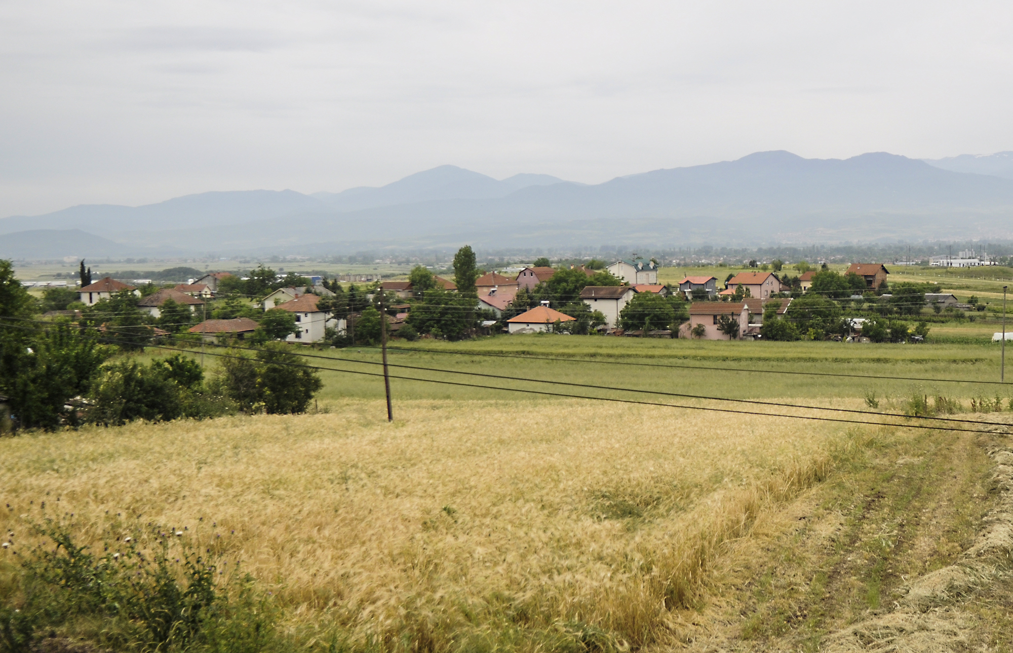 Бунарџик, поглед од црквата Свети Спас